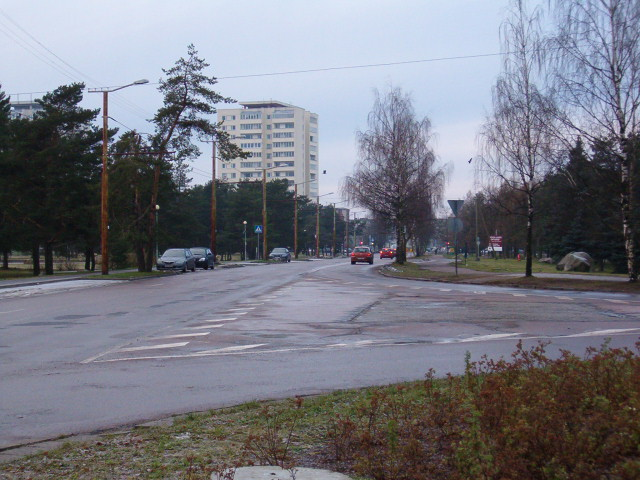 Keskuse tänav